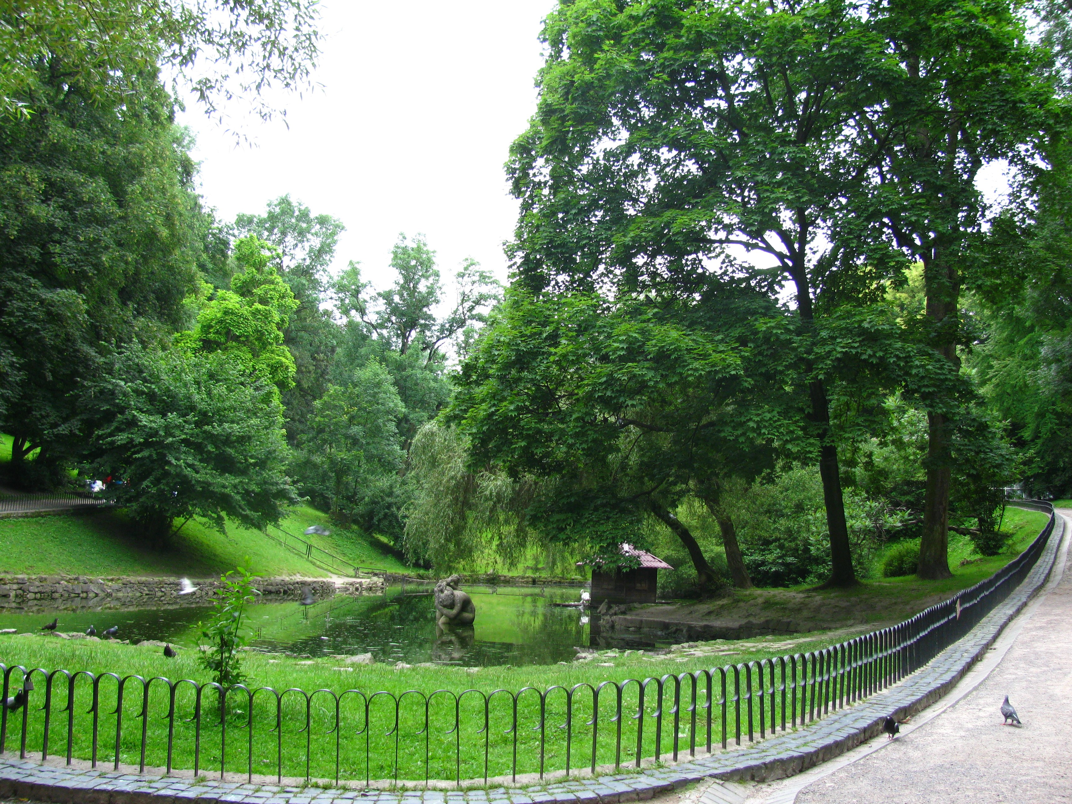 Стрийський парк озеро.jpg: озеро з лебедями у Стрийському парку Львова